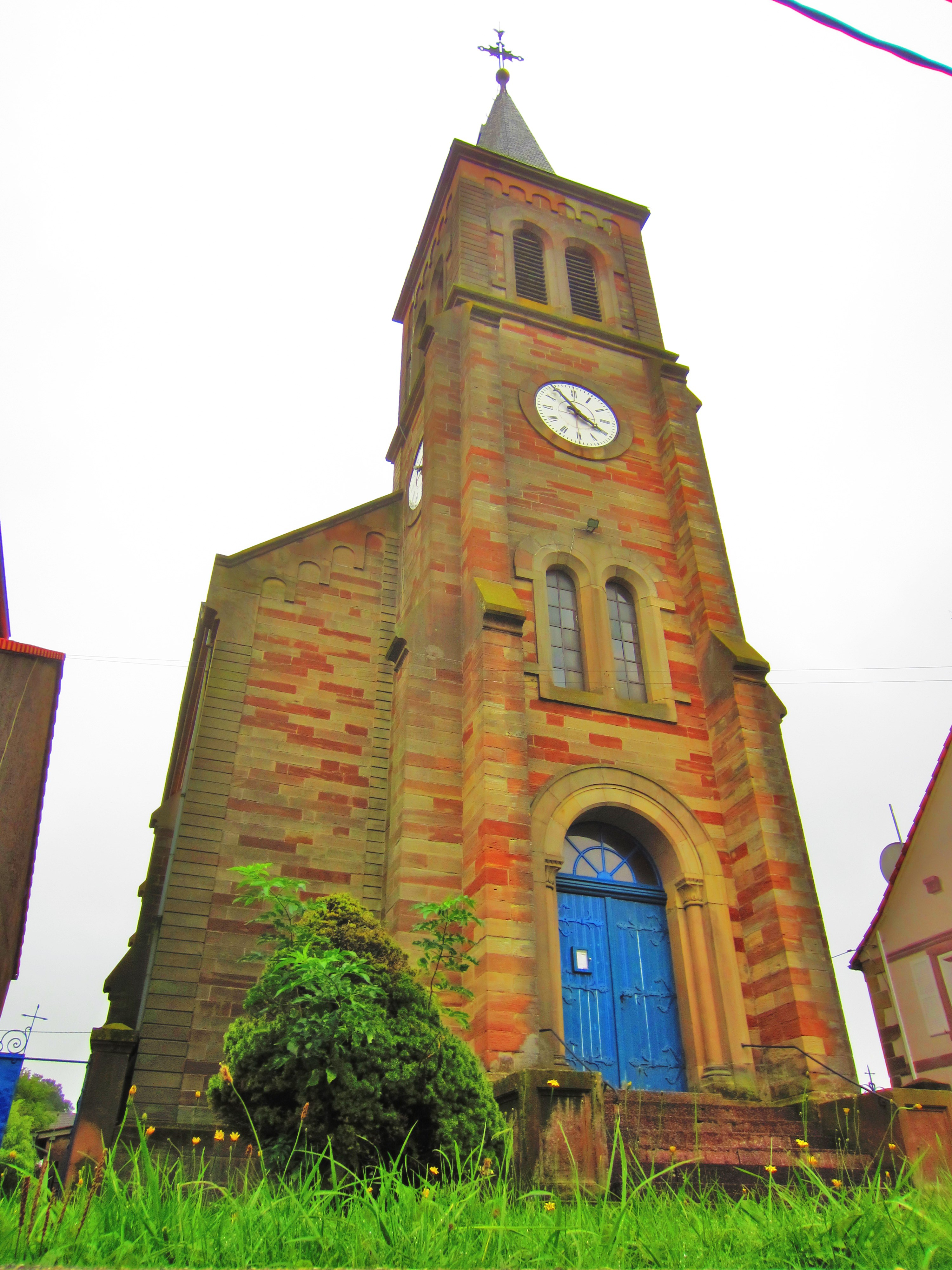 Eglise Vescheim